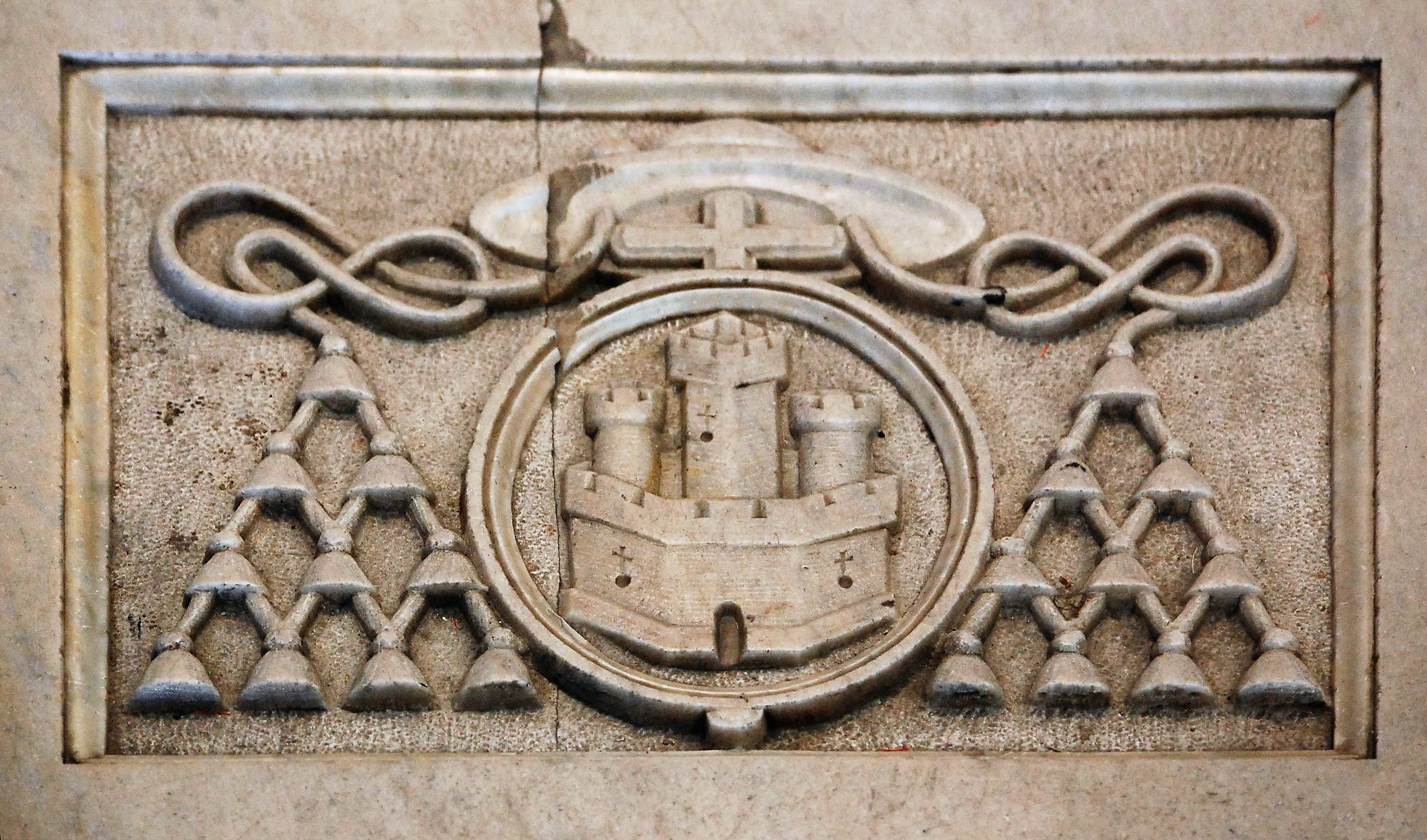 Escudo de armas en alabastro del sepulcro del Arzobispo de Toledo Alfonso Carrillo de Acuña (Carrascosa del Campo, 1410; † Alcalá de Henares, 1 de julio de 1482) en la Catedral-Magistral de Alcalá de Henares (España) a finales del siglo XV.